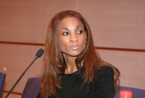 Guillermina Mekuy. Escritora, empresaria y ministra de Cultura y Turismo de Guinea Ecuatorial. Foto de Carlos Dafonte.